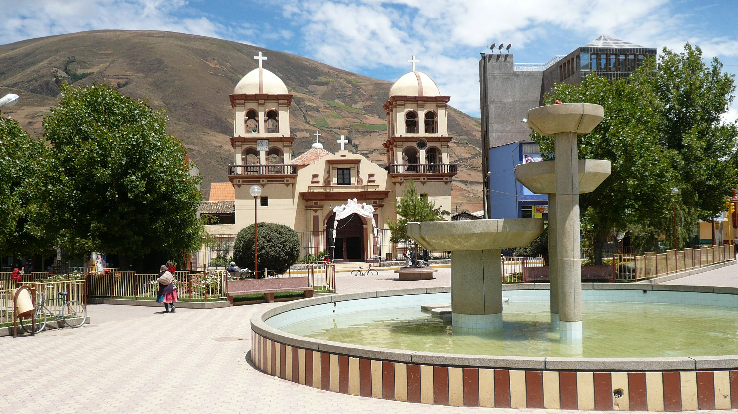 Vista parcial de la plaza de Pampas.